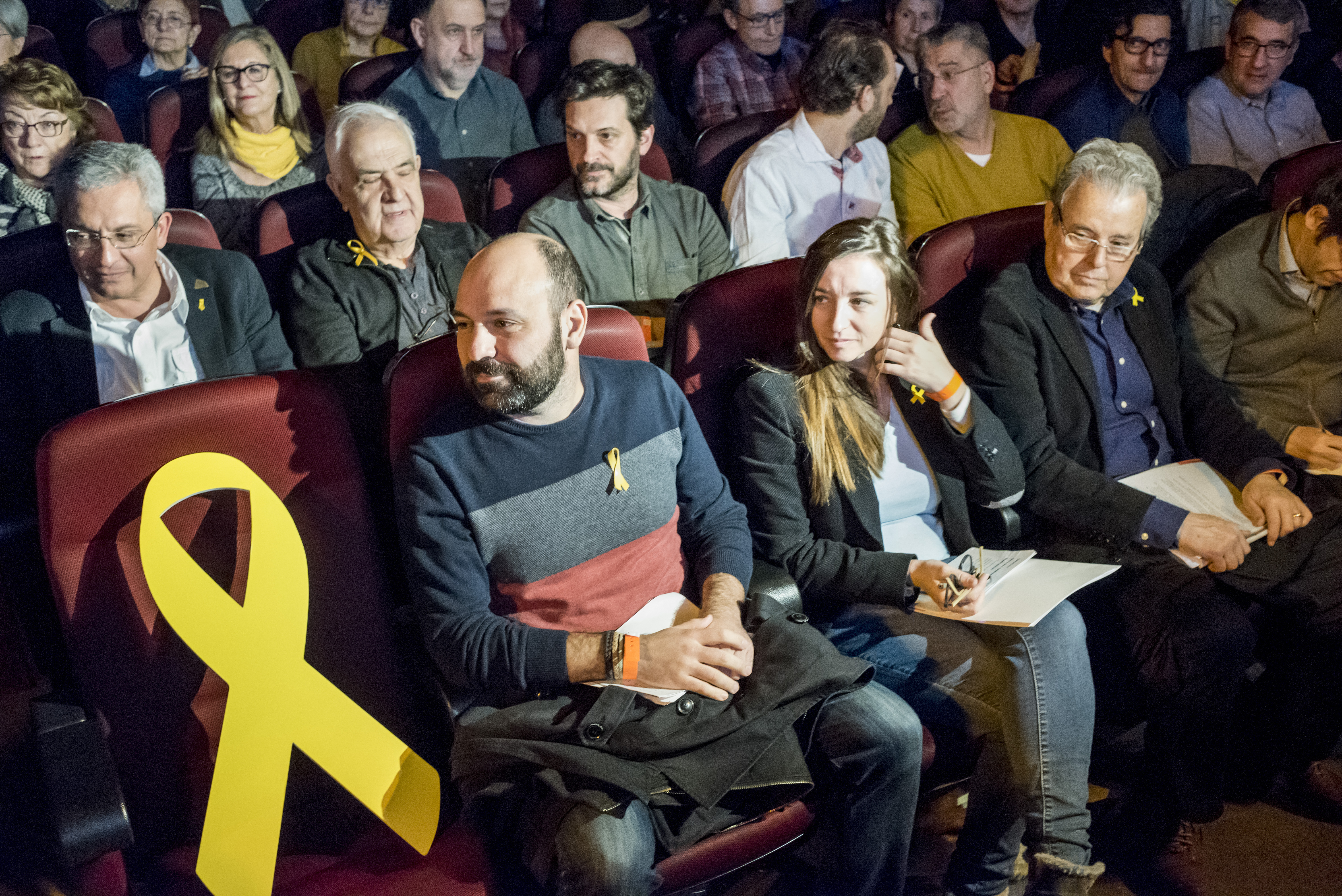 _DC68085